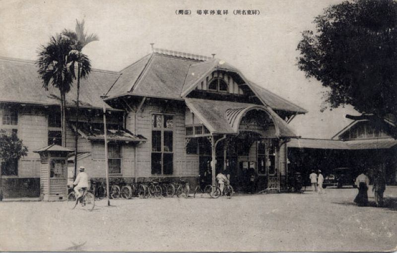 日治時期的屏東停車場、屏東驛，後來的屏東車站